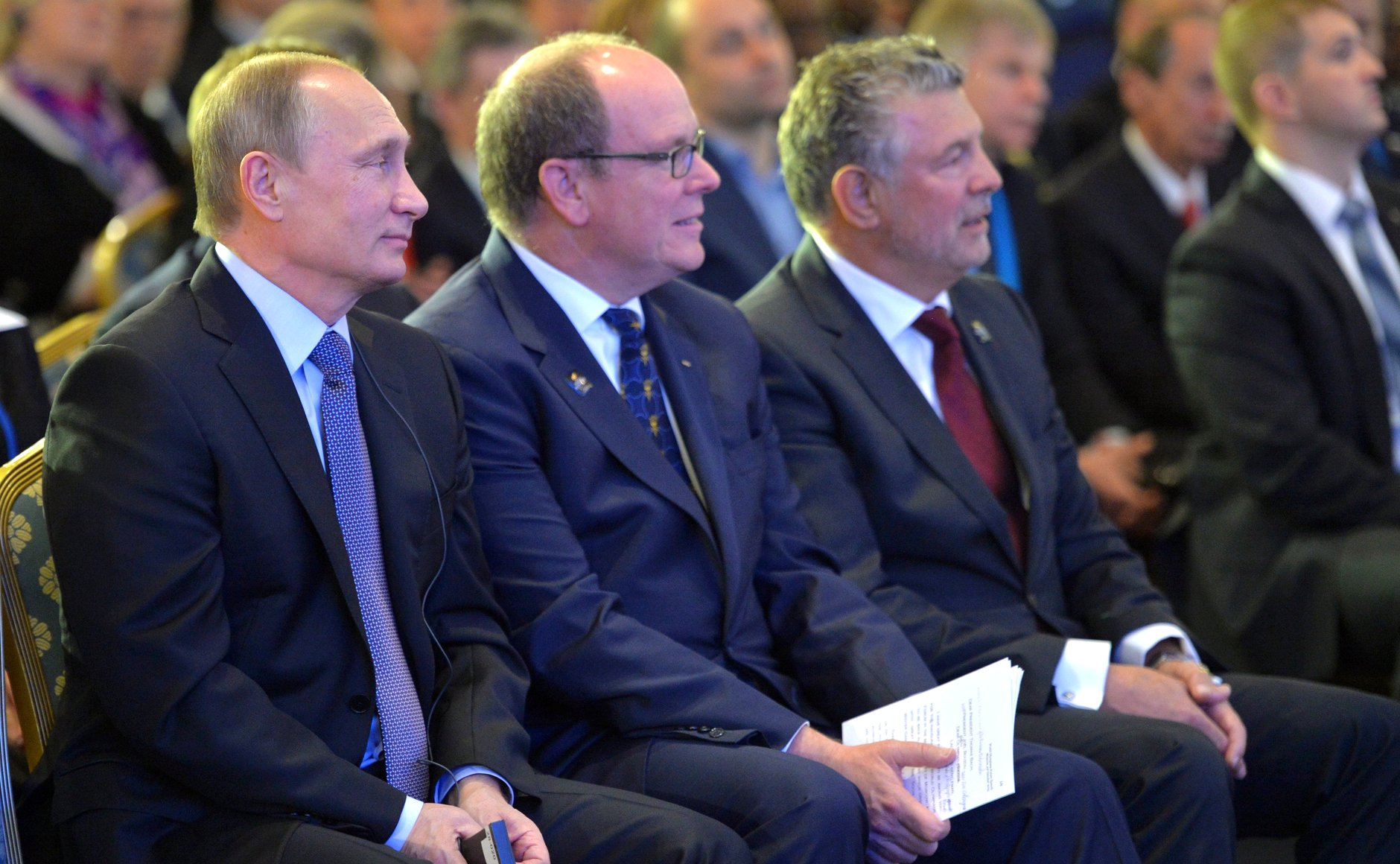 Vladimir Putin, Prince Albert II of Monaco and Joël Bouzou at the First World Olympians Forum held in Moscow in 2015